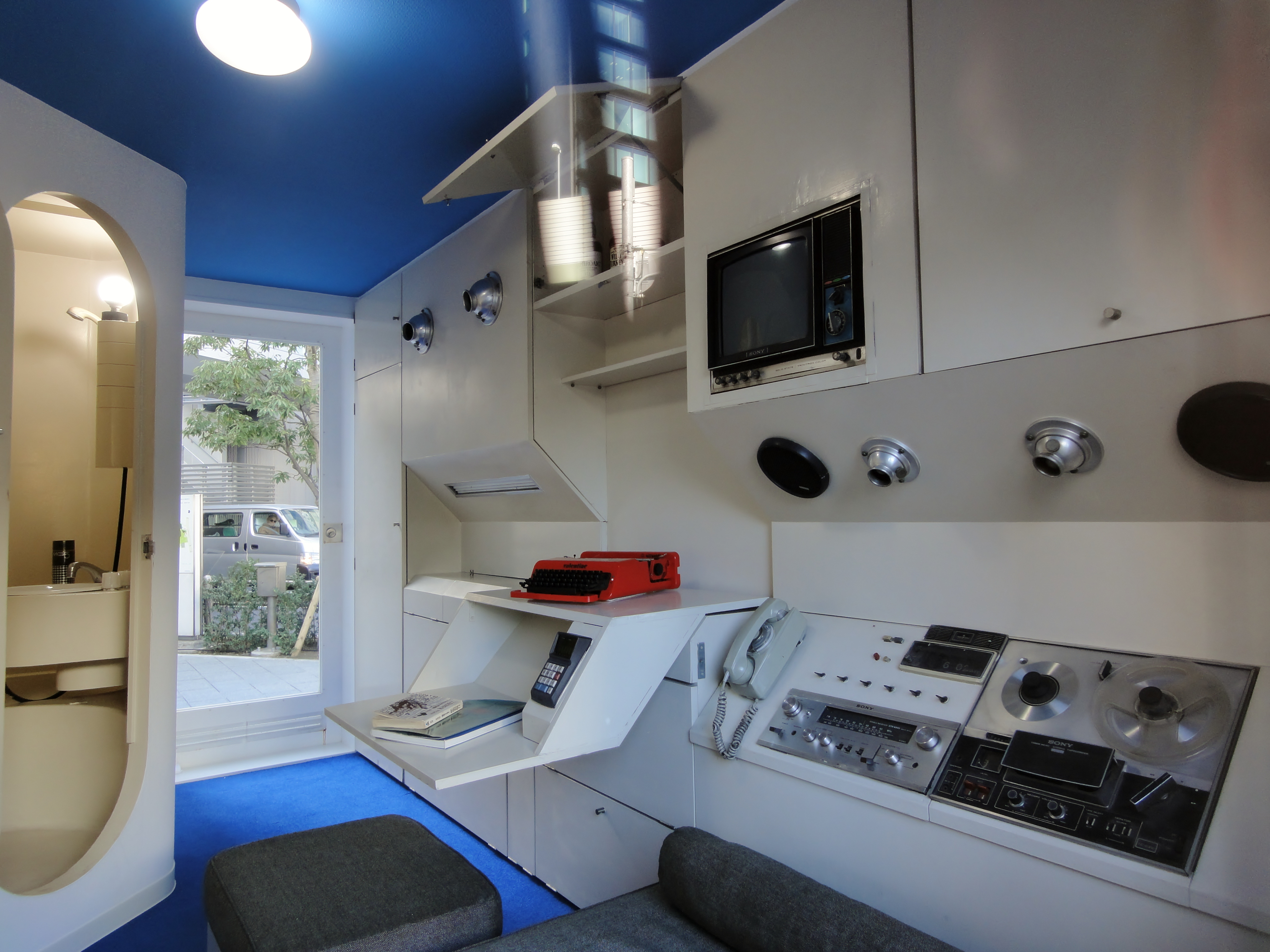 中銀カプセルタワービル 住宅カプセル reference